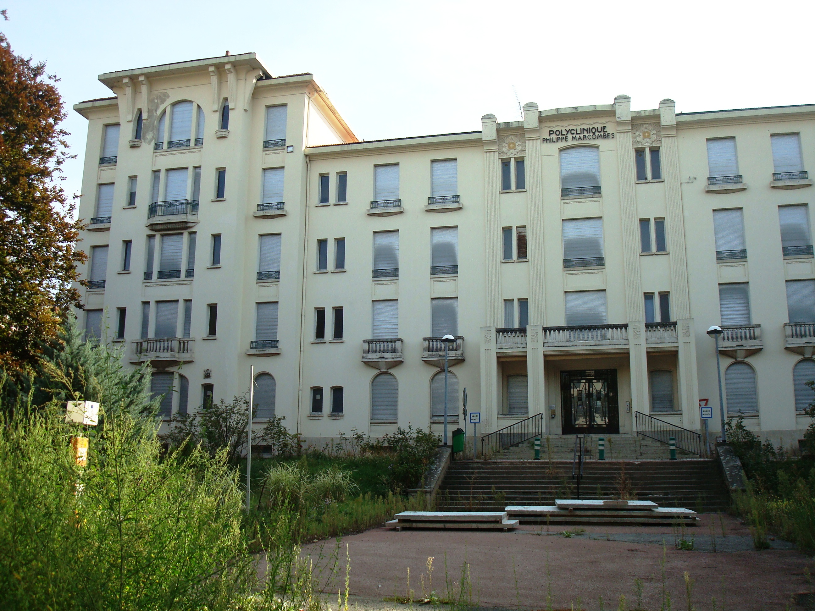 Polyclinique Phillipe Marcombes, Hôtel Dieu, Clermont-Ferrand .